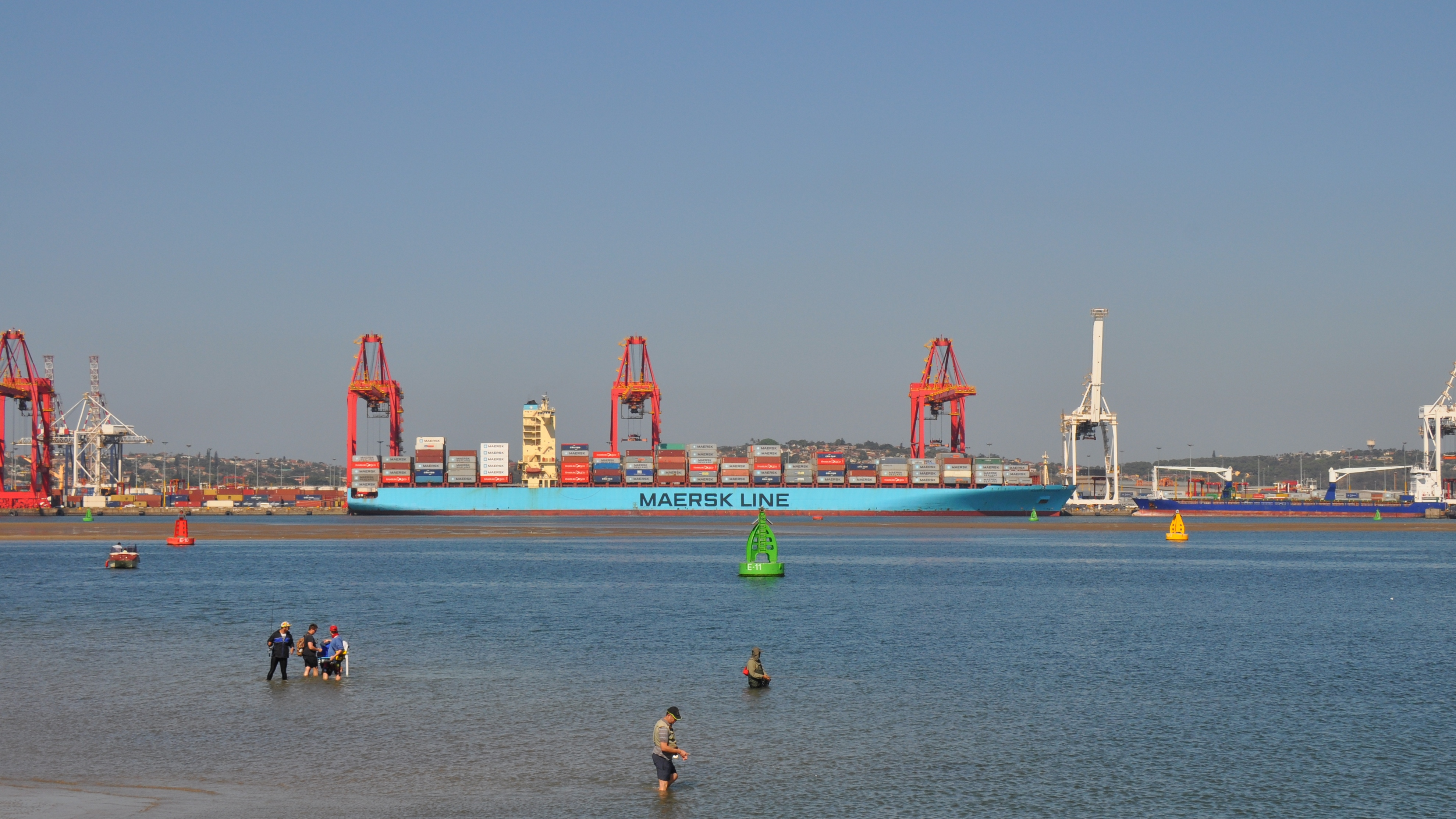 Pier No. 2 des Container-Terminal Durban mit Containerschiff Maersk Stockholm. Im Vordergrung die Untiefen bei Ebbe.